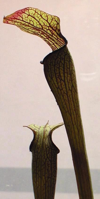 Schläuche von Sarracenia jonesii (Sarracenia rubra subsp jonesii)